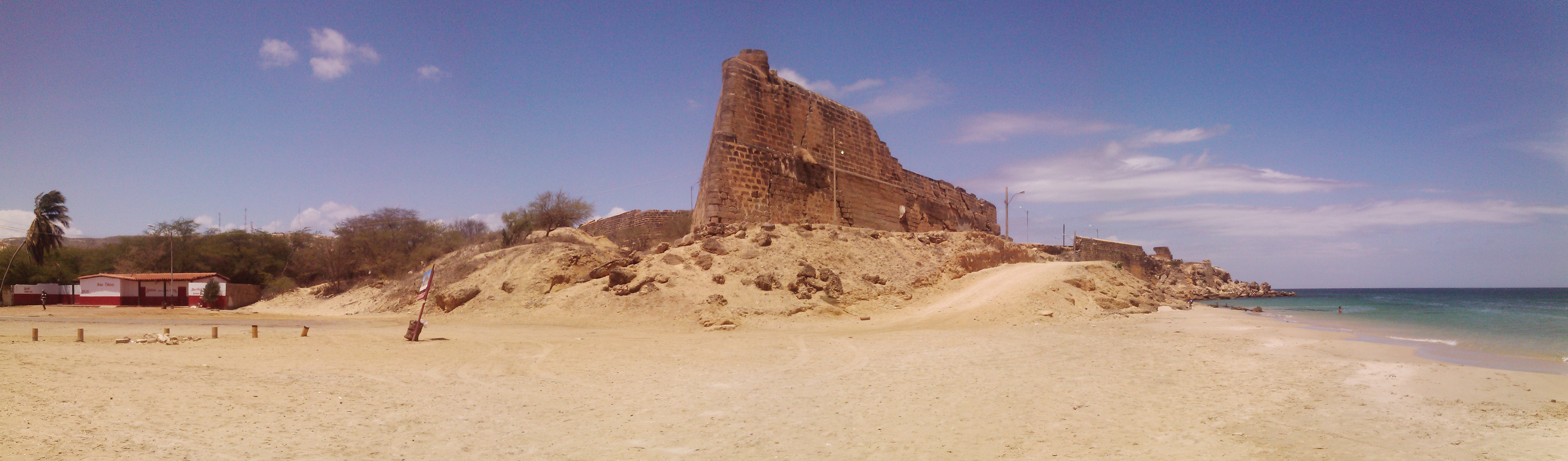 Vista panoramica del castillo, a su lado derecho la playa el castillo